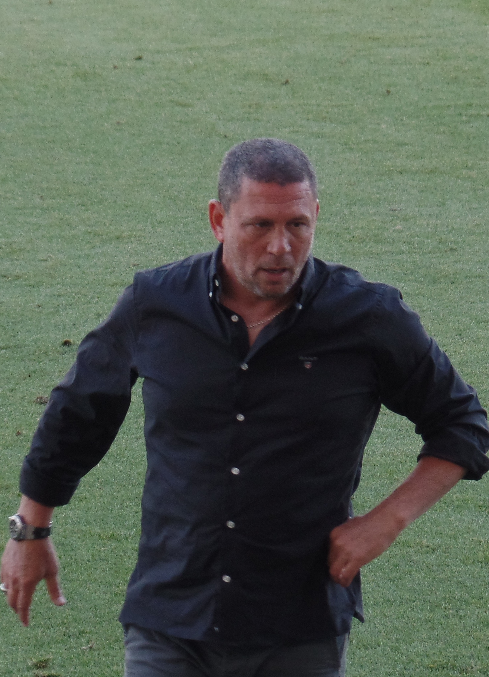 ניר קלינגר בעמדת המאמן